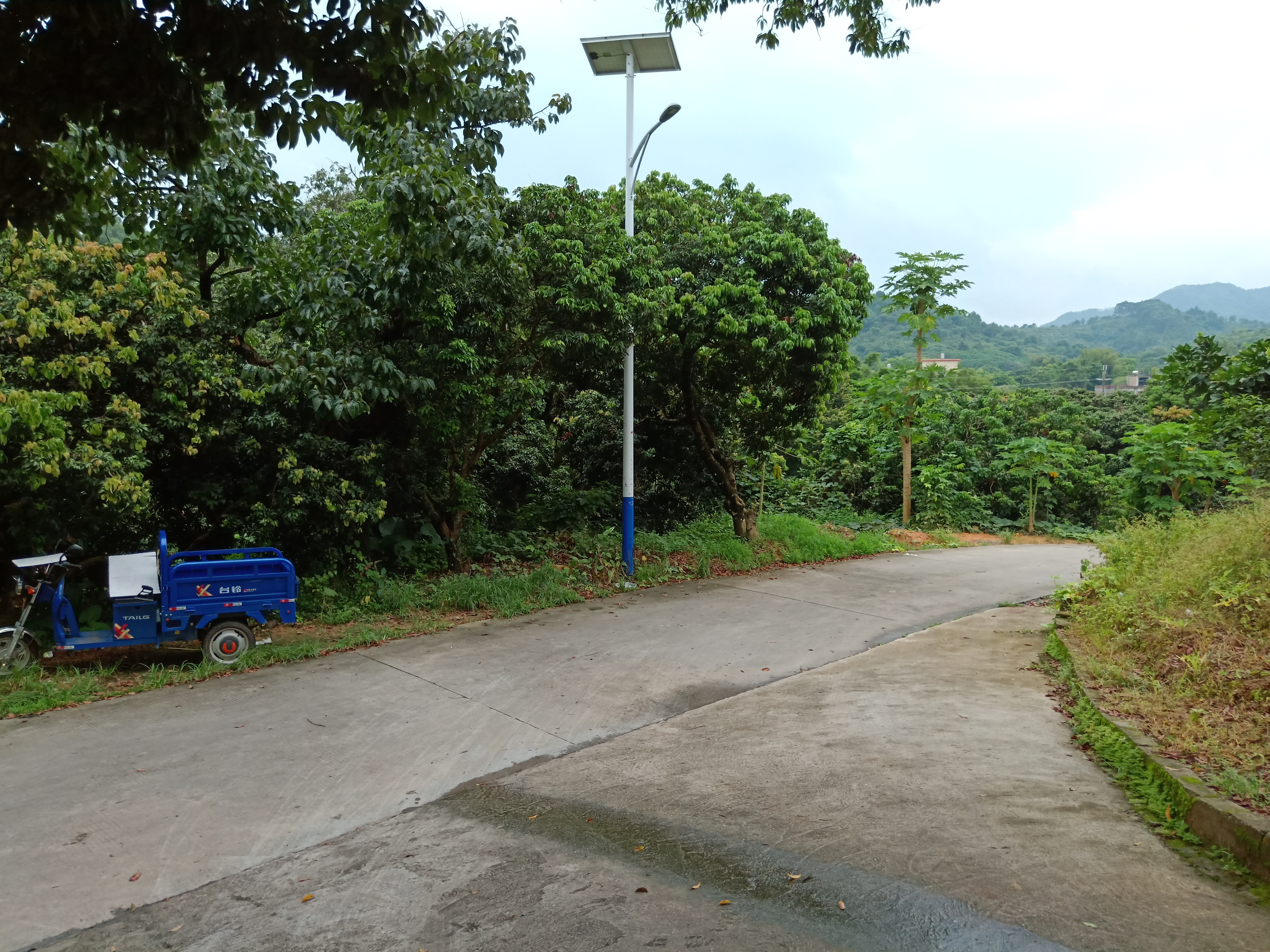 粵語: 中國廣東廣州從化區太平鎮神岡共星村一角